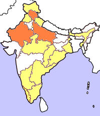 Kartorna bygger på resultat i senaste delstatsval (Juni 2004). Rött betyder att partiet deltar i delstatsregeringen, orange att partiet vann mandat i senaste delstatsvalet och gult att partiet hade lanserat kandidater men utan att vinna mandat. Kartorna tar inte hänsyn till avhopp, partifusioner och fyllnadsval under den ordinarie mandatperiodens gång.